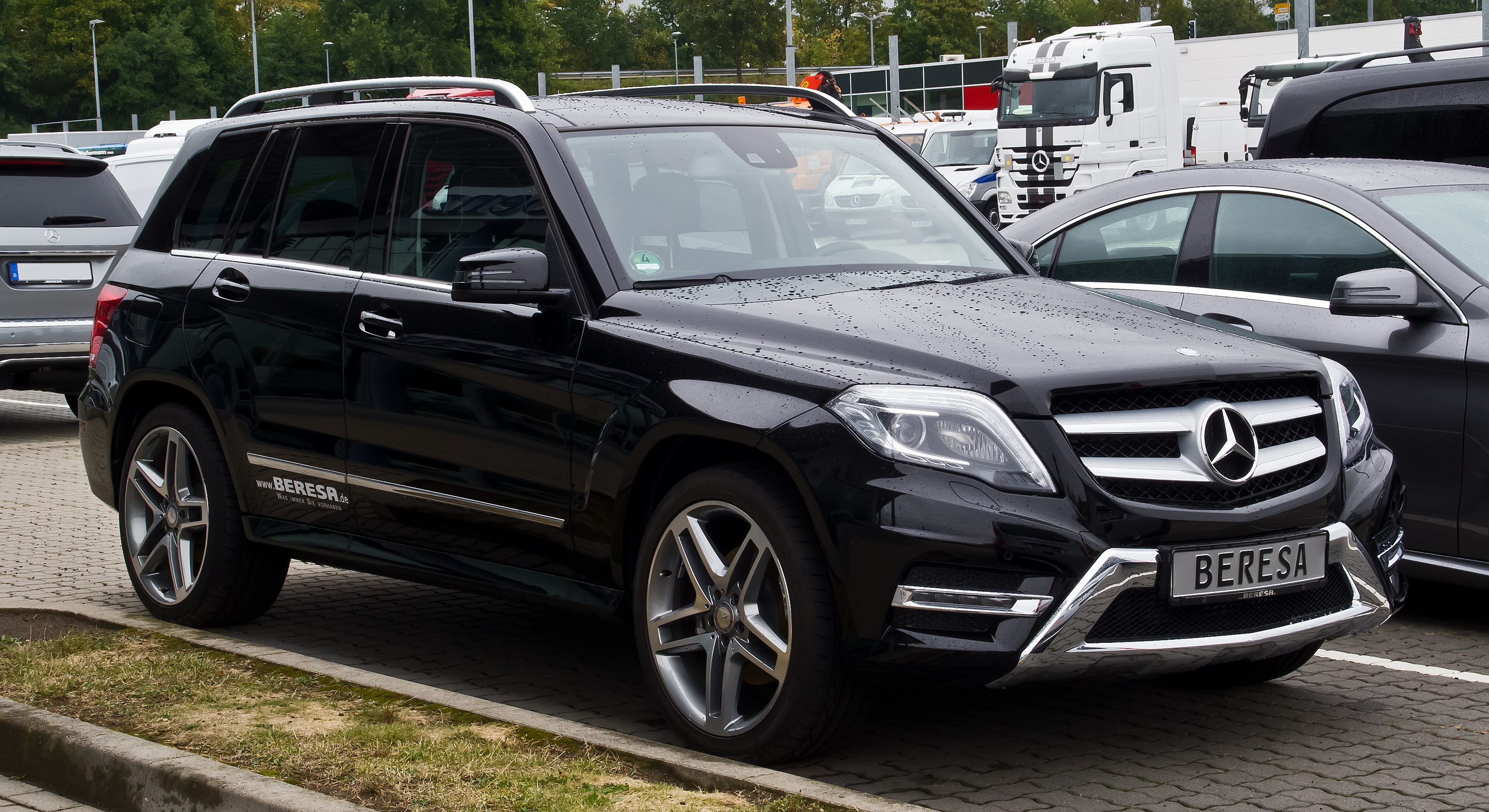 Mercedes-Benz GLK 250 4MATIC Sport-Paket AMG (X 204, Facelift)